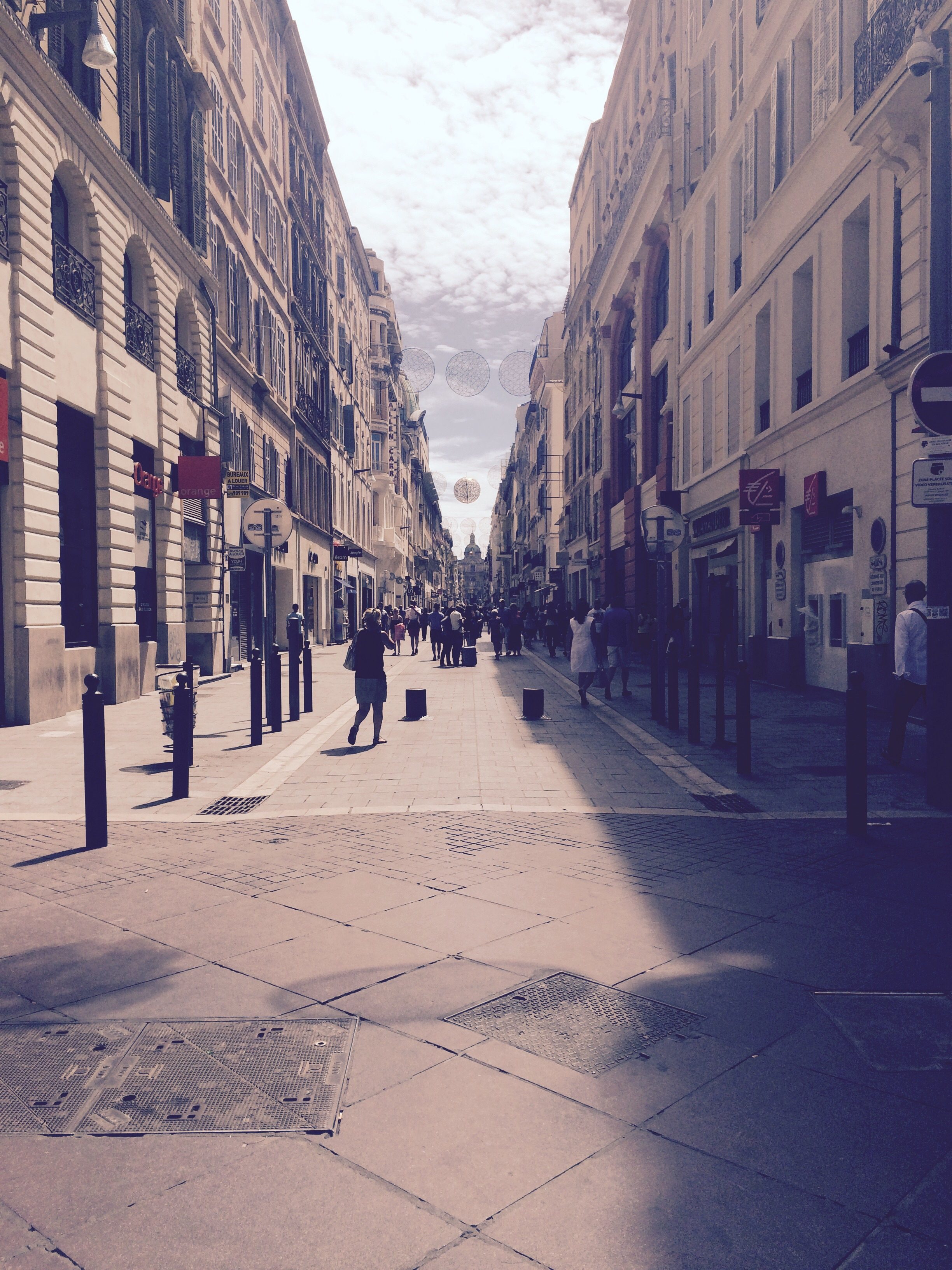 Rue Saint-Ferréol de Marseille depuis la Canebière